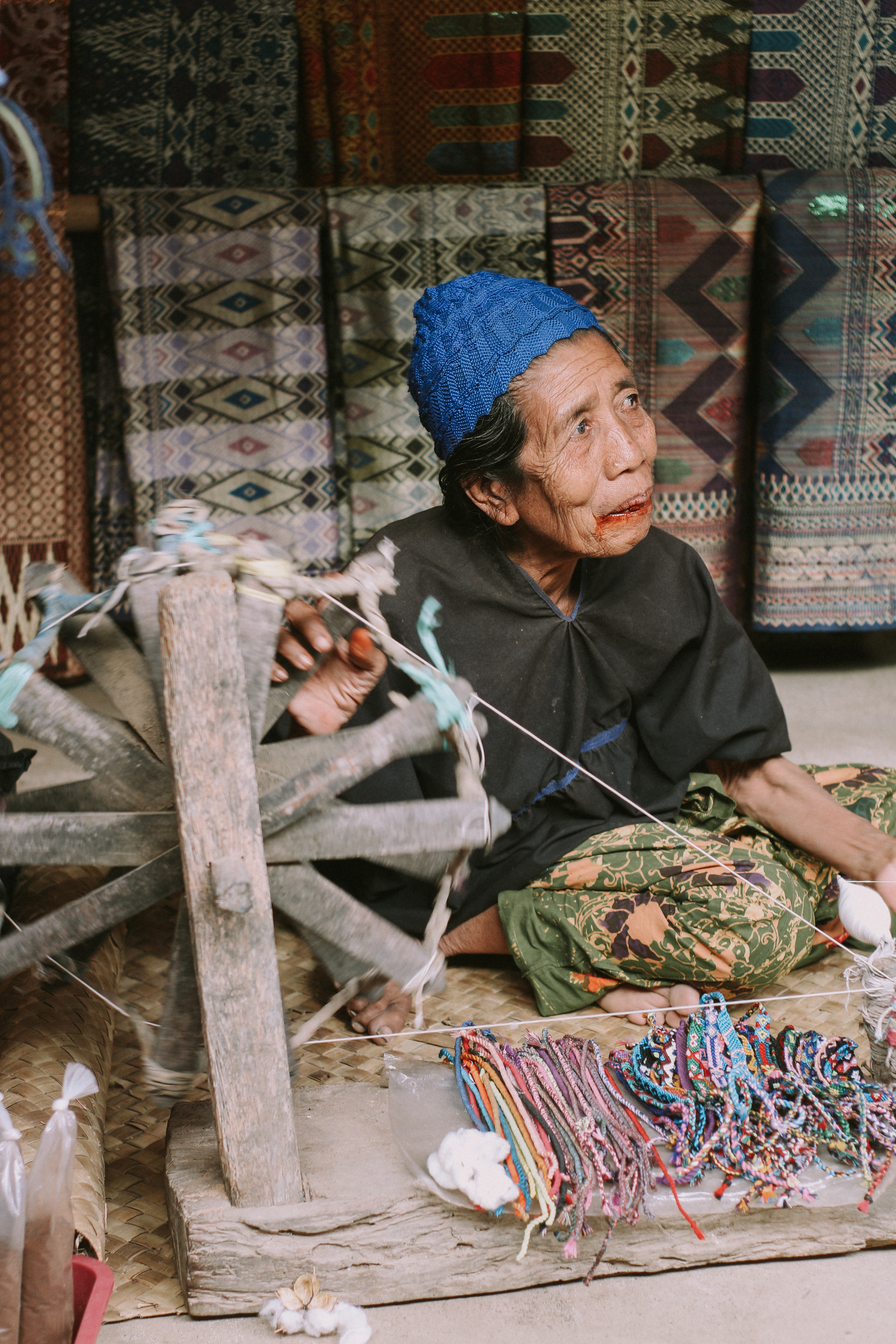 Wanita lanjut usia sedang membuat kerajinan tangan di desa Sade.